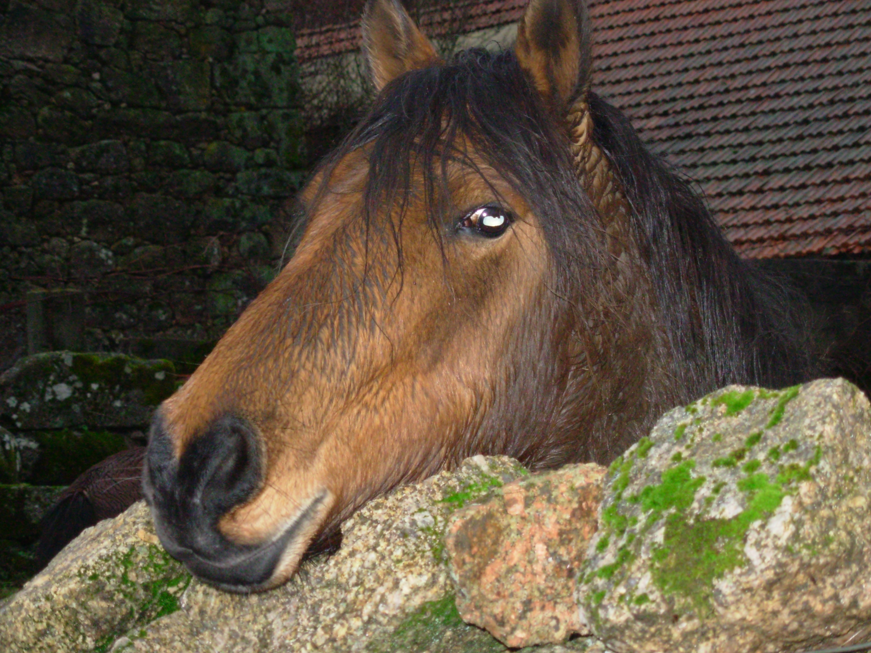 Garrano, Lugar de Podre, Castro Laboreiro, Melgaço, Viana do Castelo, Portugal.